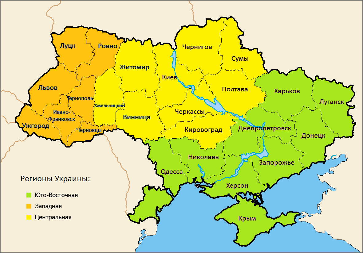 Политические регионы Украины